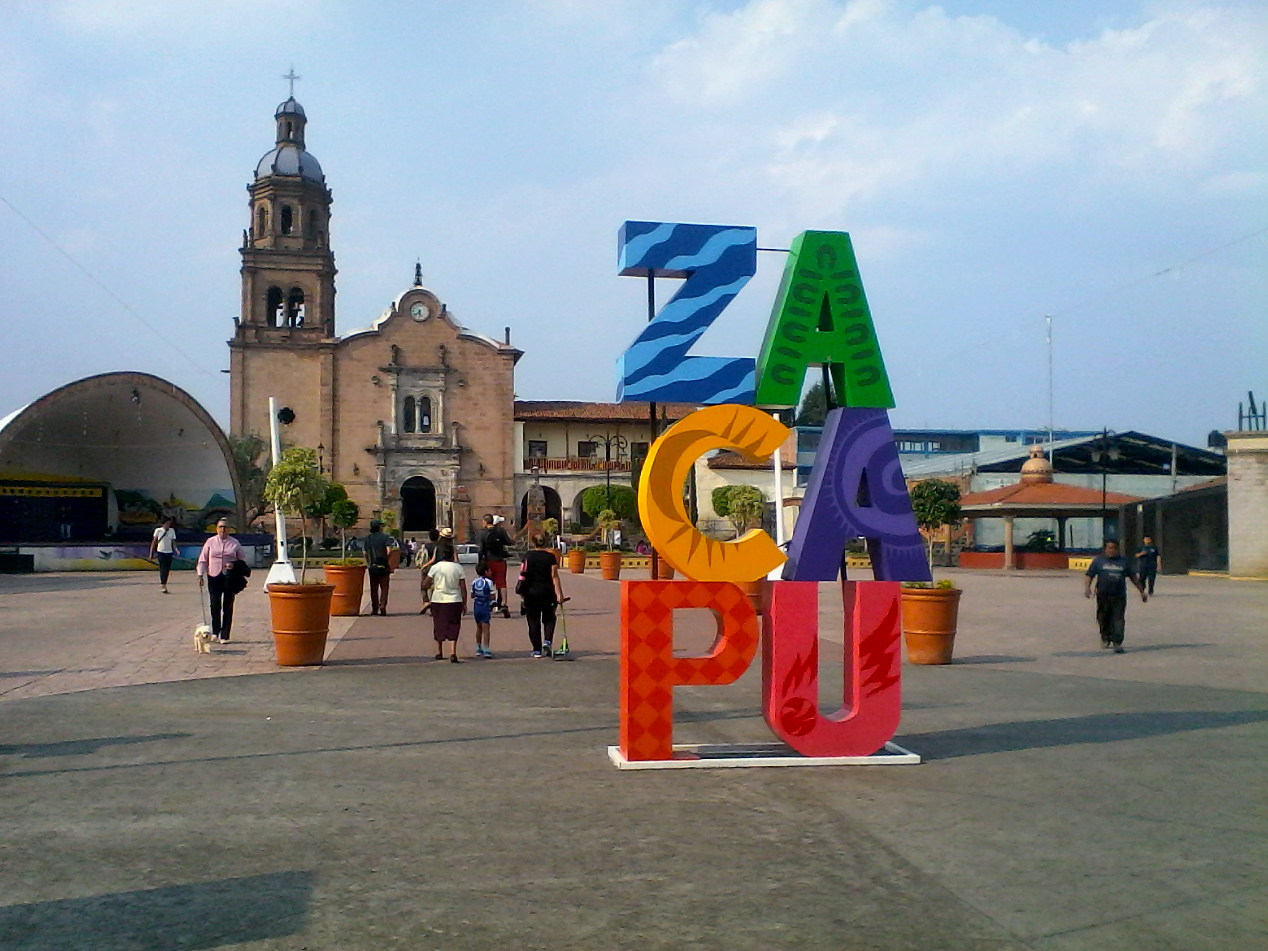 Zacapu despues del letrero